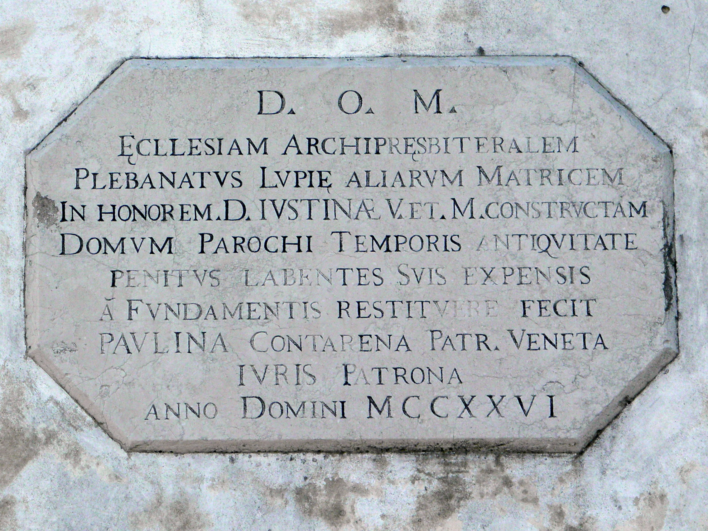 Lova, frazione di Campagna Lupia: lapide murata sulla facciata della chiesa di Santa Giustina.